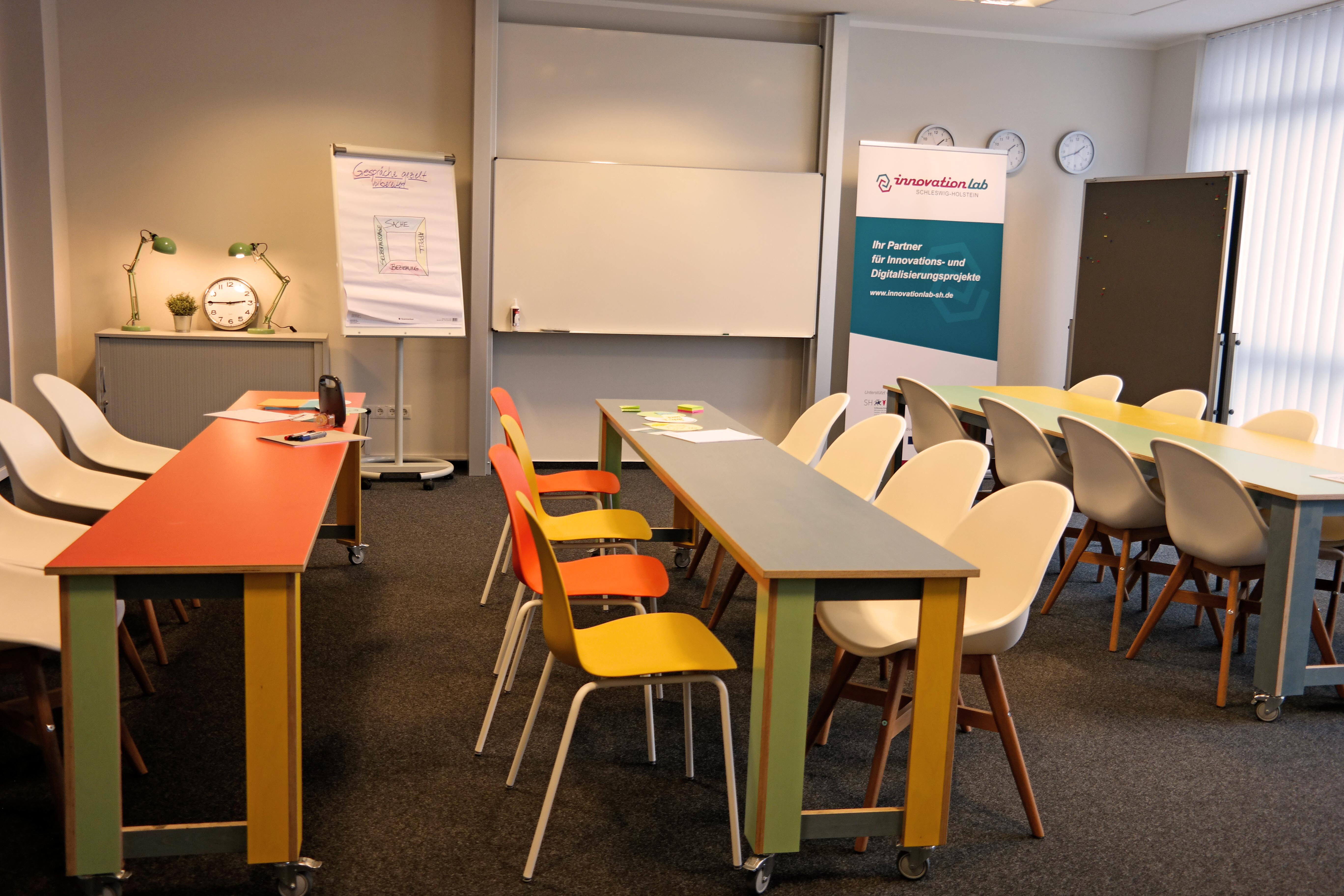 Innovationlab der DHSH